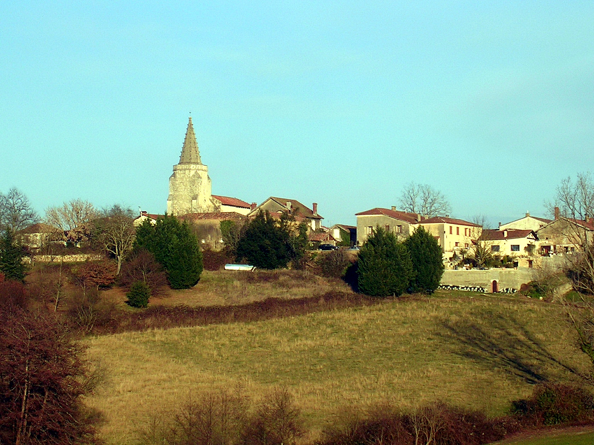 Vue du village de Brassempouy, en Chalosse (département des Landes, France)